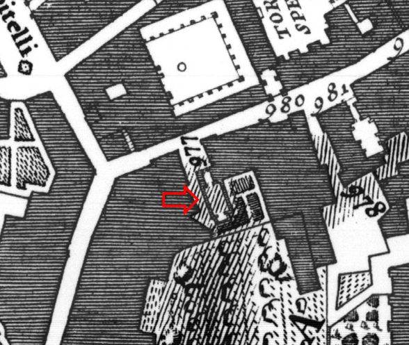 Pianta di Nolli